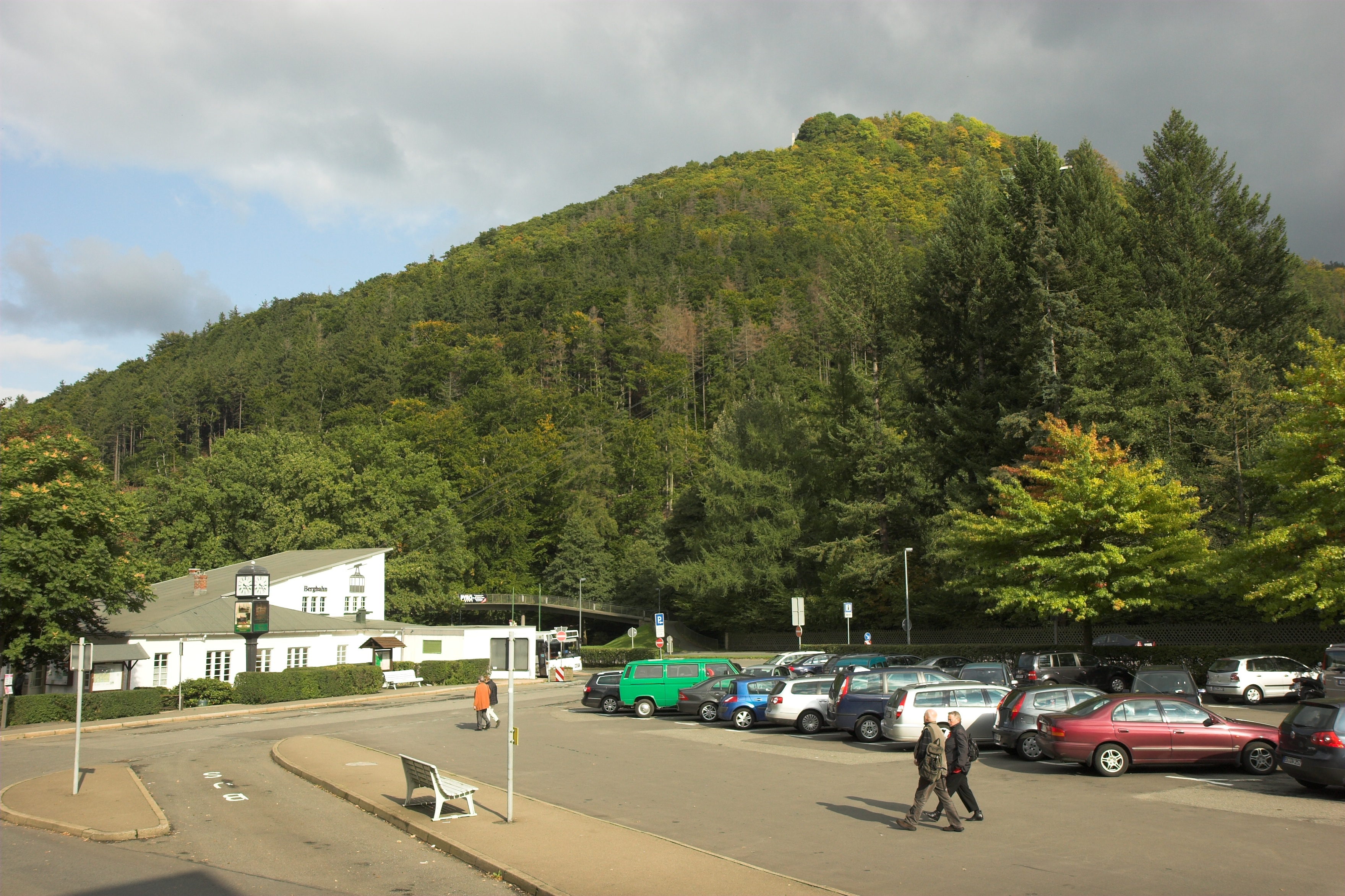 Die Talstation der Burgseilbahn in Bad Harzburg und der Große Burgberg mit dem Obelisken auf den Gipfel